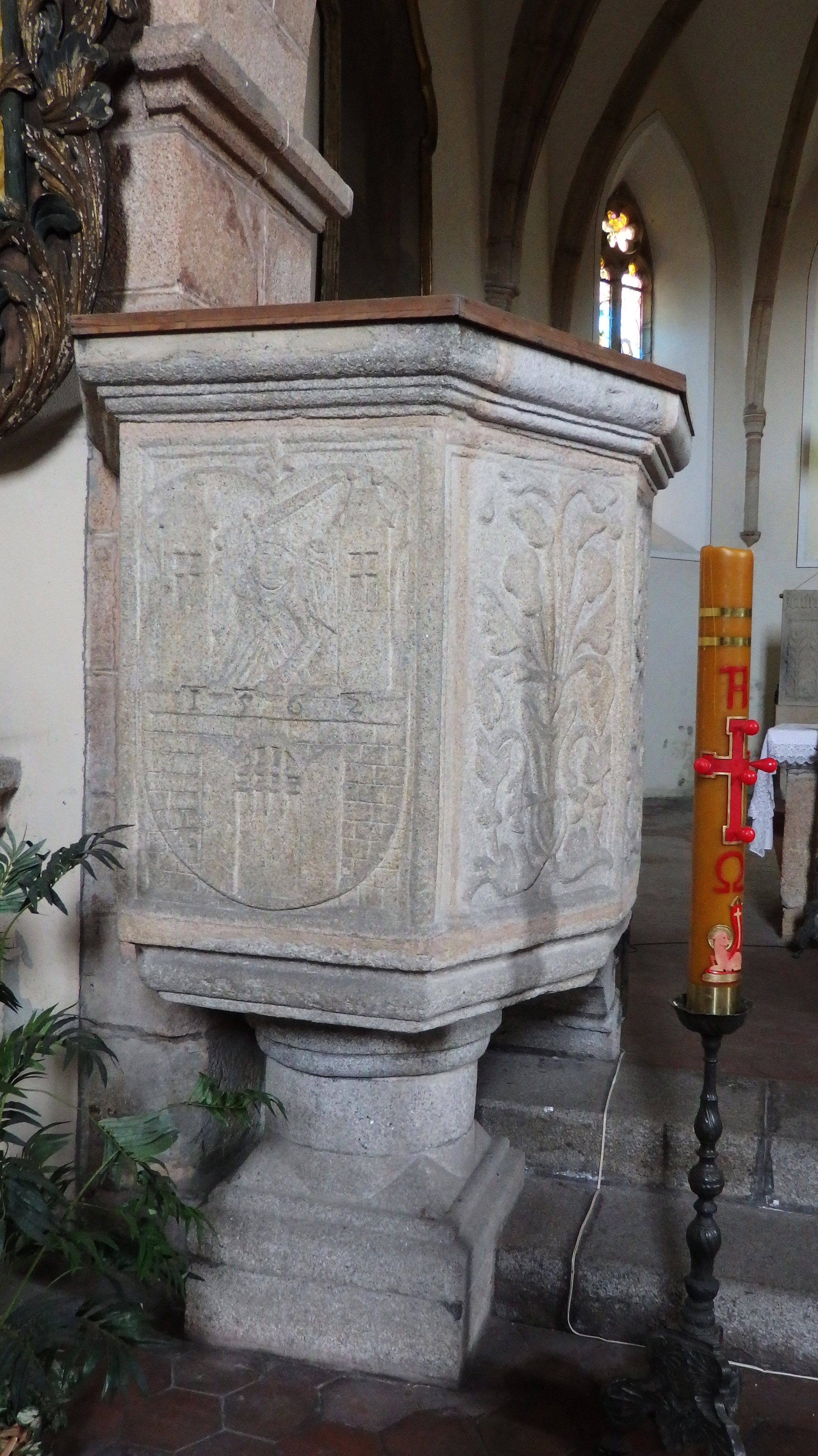 Kostel U Svatých v Domažlicích, renesanční kazatelna